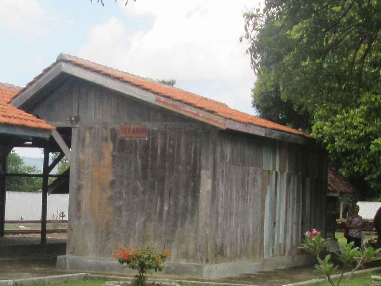 Halte Tekaran yang sudah dijadikan pajangan di Museum Kereta Api Ambarawa, 2016